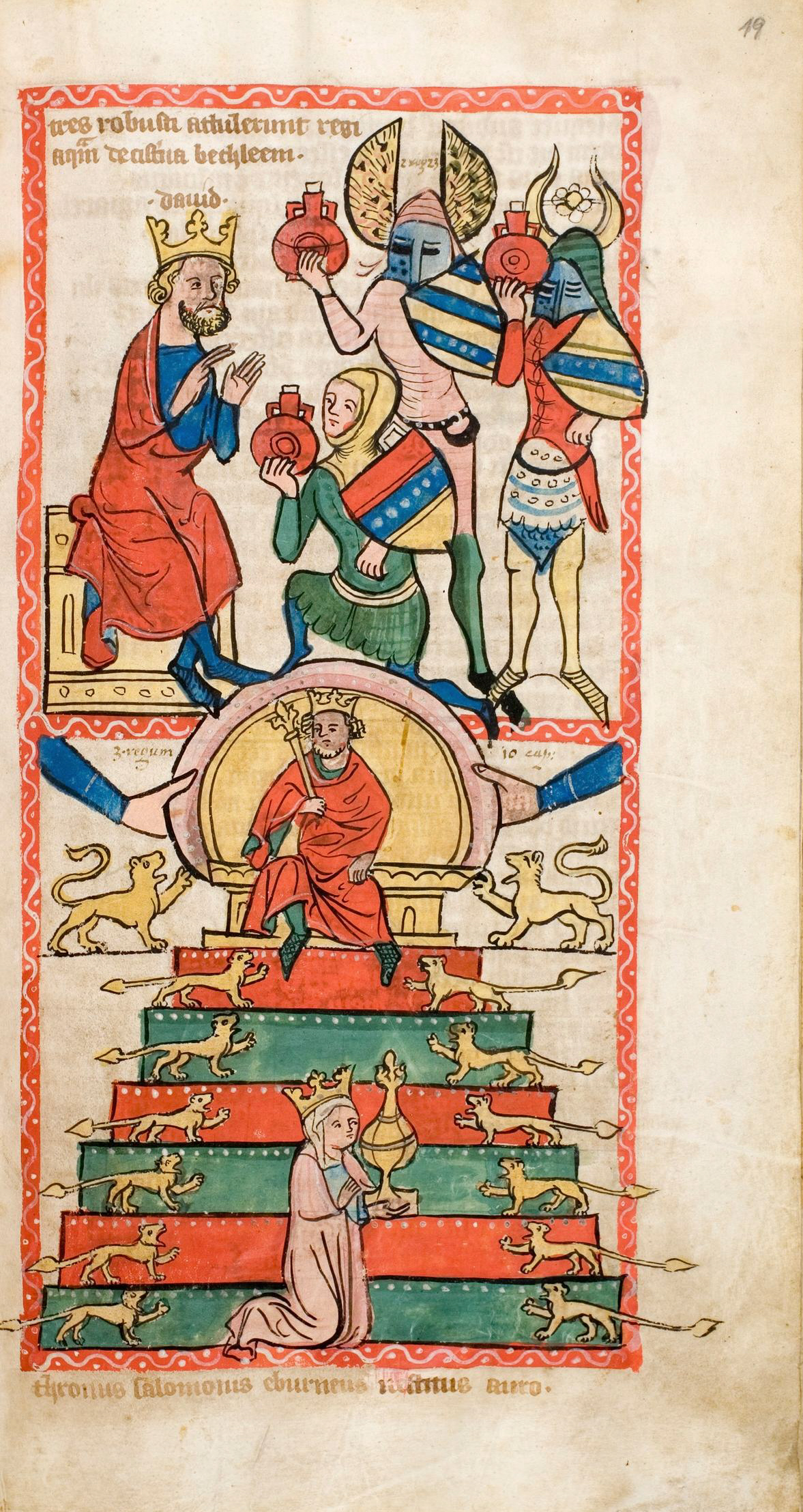 Speculum Humanae Salvationis, Westfalen oder Köln, um 1360. ULB Darmstadt, Hs 2505, fol. 19r